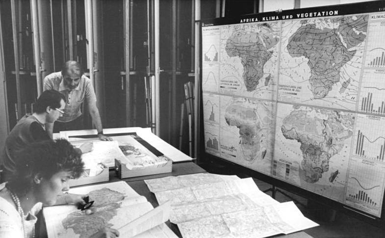 Leipzig, Deutsche Bücherei, Kartensammlung ADN-ZB Grubitzsch 25.9.87 Leipzig: 75 Jahre Deutsche Bücherei- Über 400.000 deutschsprachige Karten und Atlanten aus aller Welt werden in der Kartensammlung für Studienzwecke genutzt. Die Deutsche Bücherei, die im Oktober 87 ihre Jubiläum begeht, ist das Gesamtarchiv des deutschsprachigen Schrifttums der Welt. Sie sammelt sämtliche Publikationen, die zwischen 1913 und 1945 im deutschen Reich und seit dem 8. Mai 1945 auf den Territorien der DDR, der BRD und von Berlin (West) herausgegeben wurden und werden. Die "DB" verfügt über einen Bestand von mehr als 8 Millionen Bibliographischen Einheiten. (siehe 14,16,17 N)